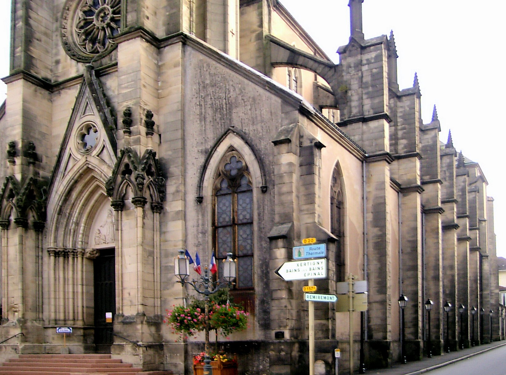 Nef d’Église Saint-Amé á Plombières-les-Bains